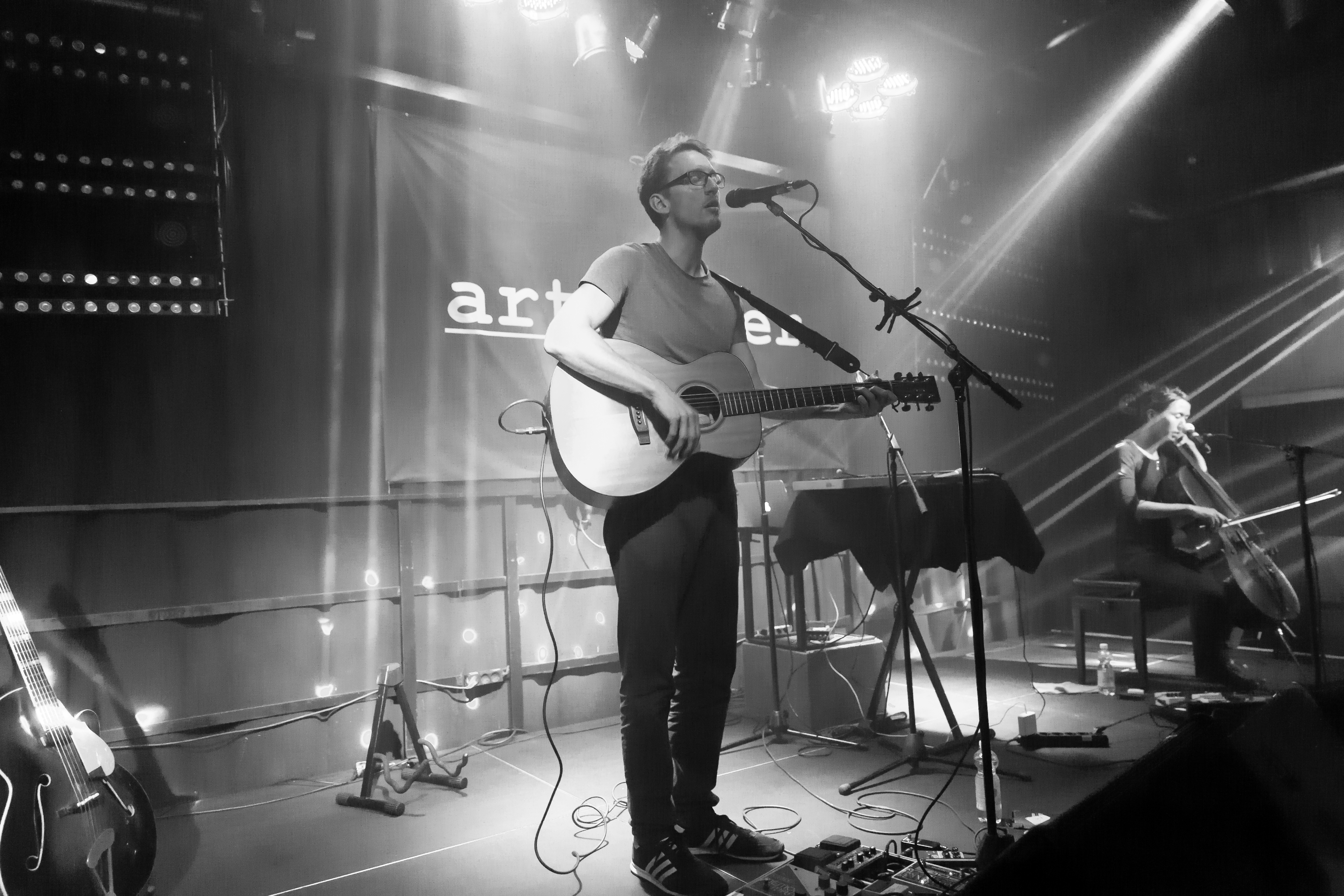 Spaceman Spiff live im Artheater in Köln im Januar 2017 during Spaceman Spiff at artheater, Köln, Nordrhein-Westfalen, Germany on 2017-01-20, Photo: Sven Mandel